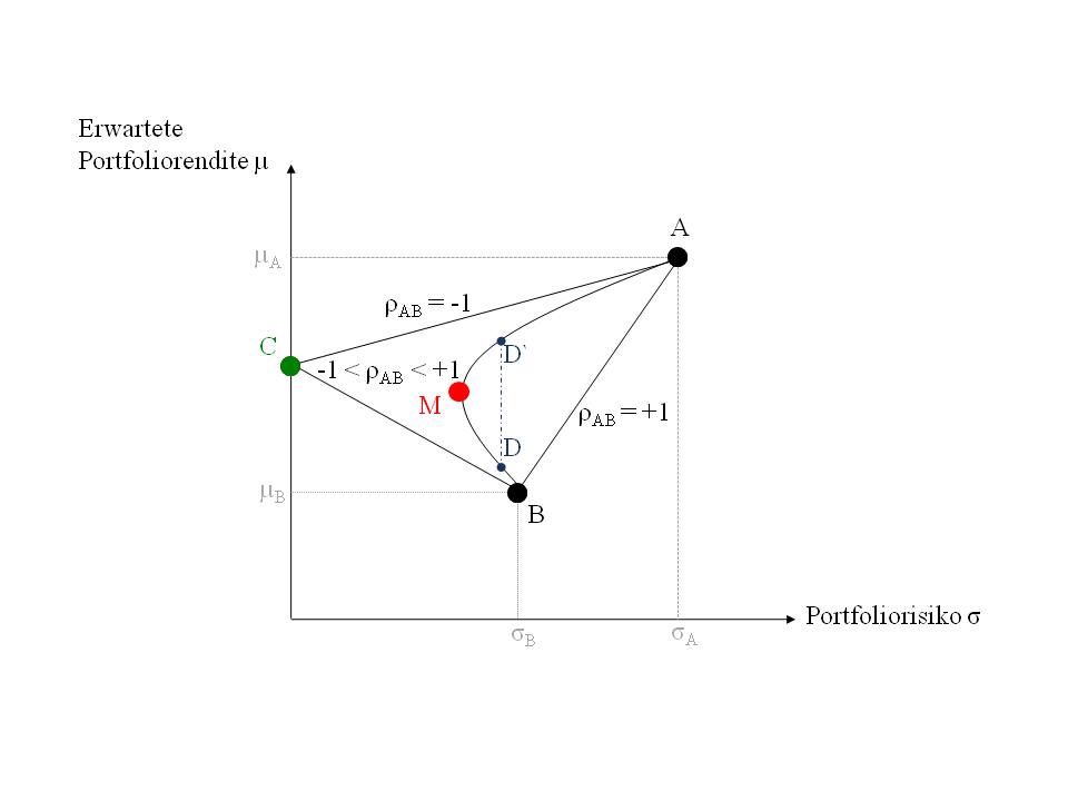 Grafik